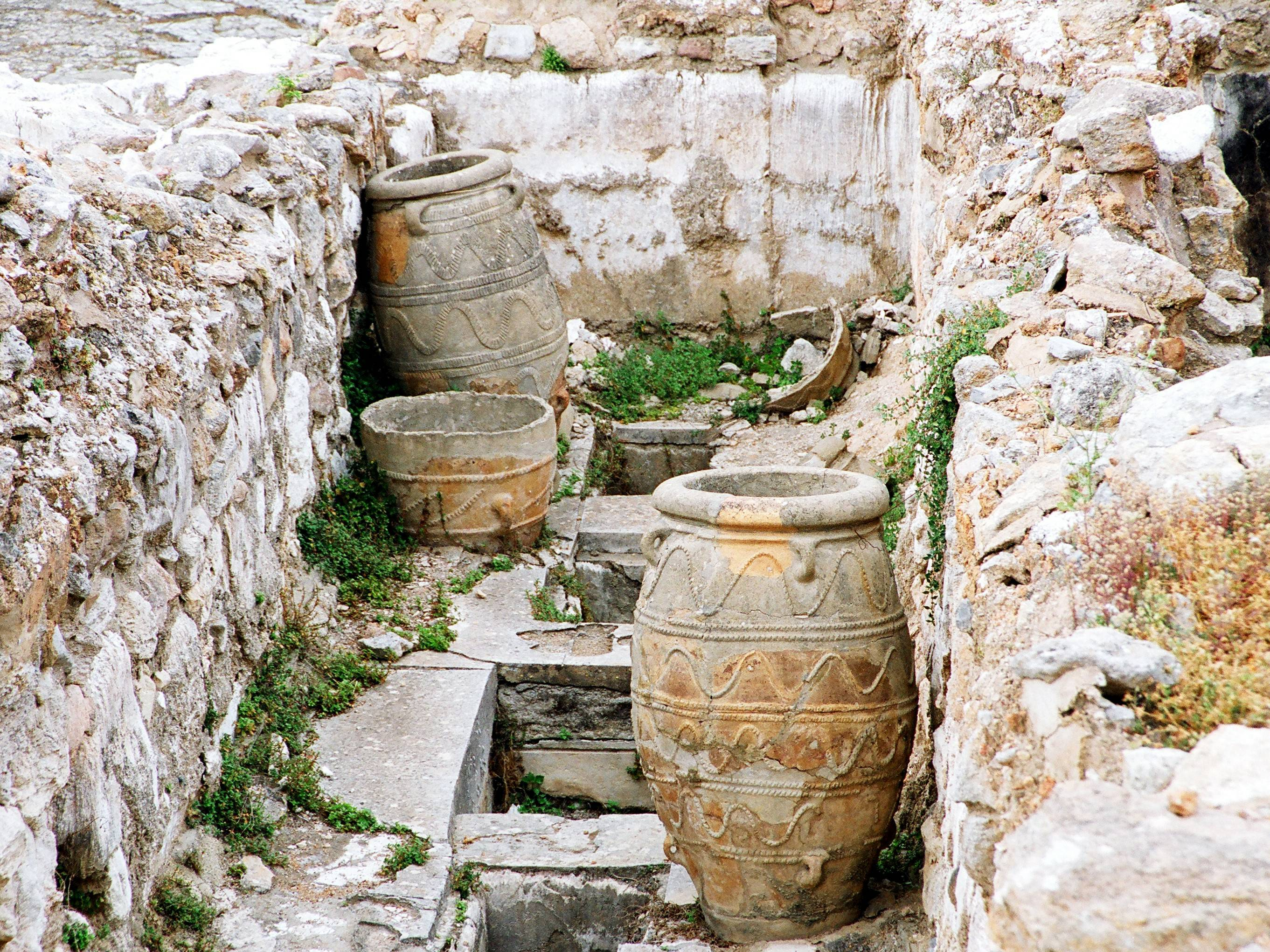 Knossos südlich von Iraklio, Kreta, Griechenland